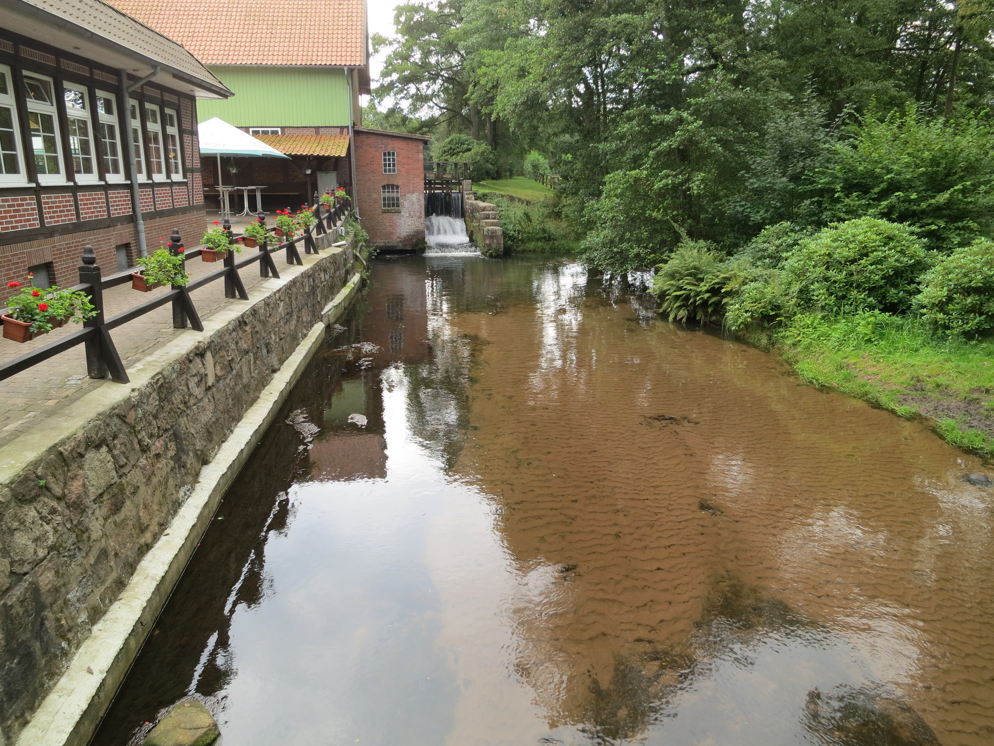 Die Sudermühle in Egestorf-Sudermühlen an der Schmalen Aue